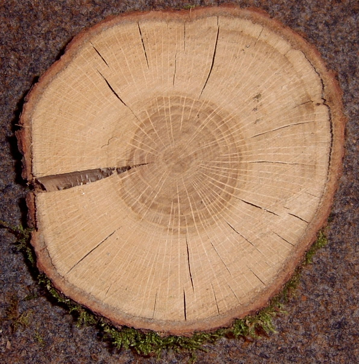 Foto taken by Lumbar 16:38, 6 November 2005 (UTC) in Osnabrück